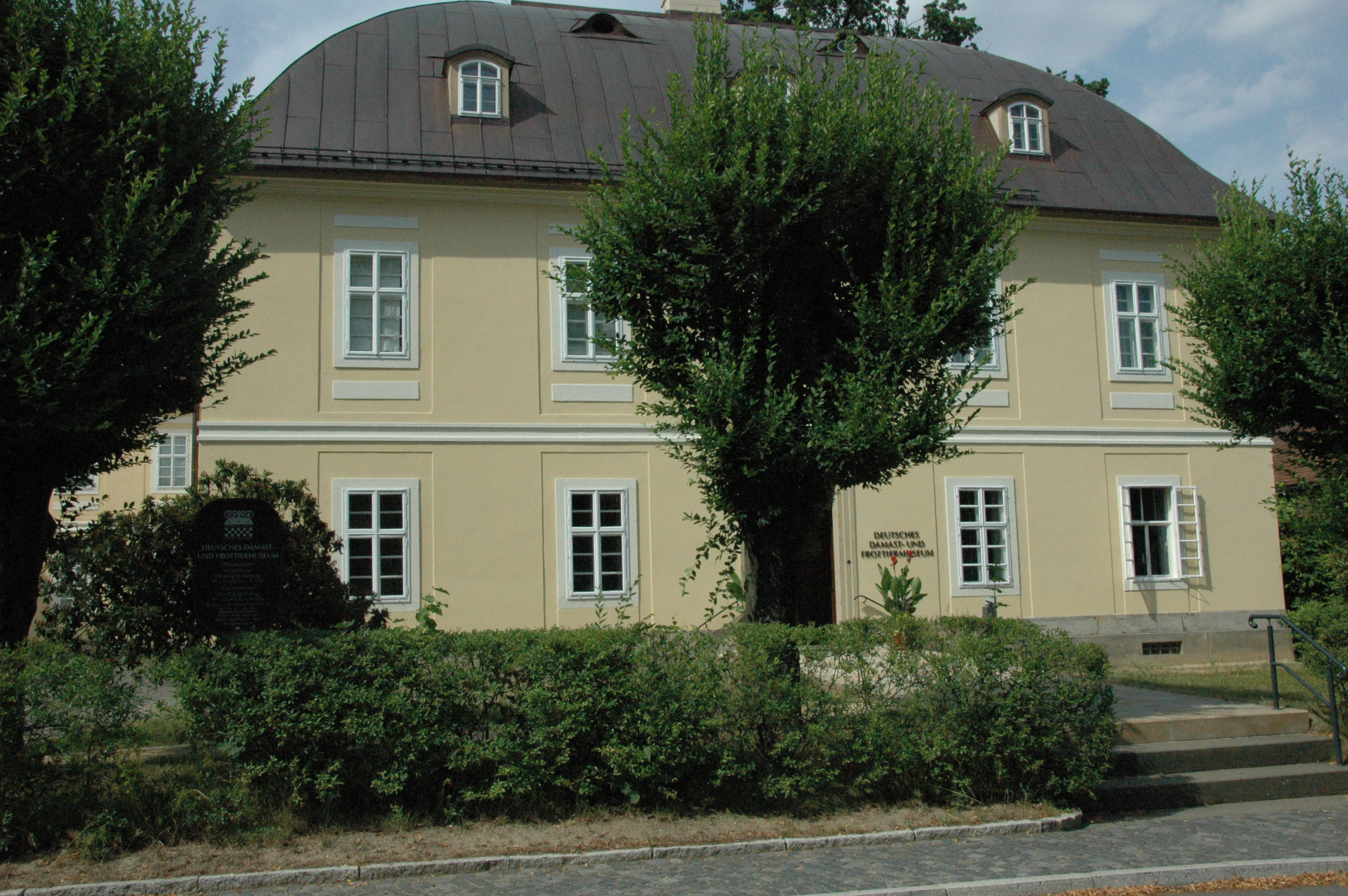 Deutsches Damast- und Frottiermuseum Großschönau in Sachsen